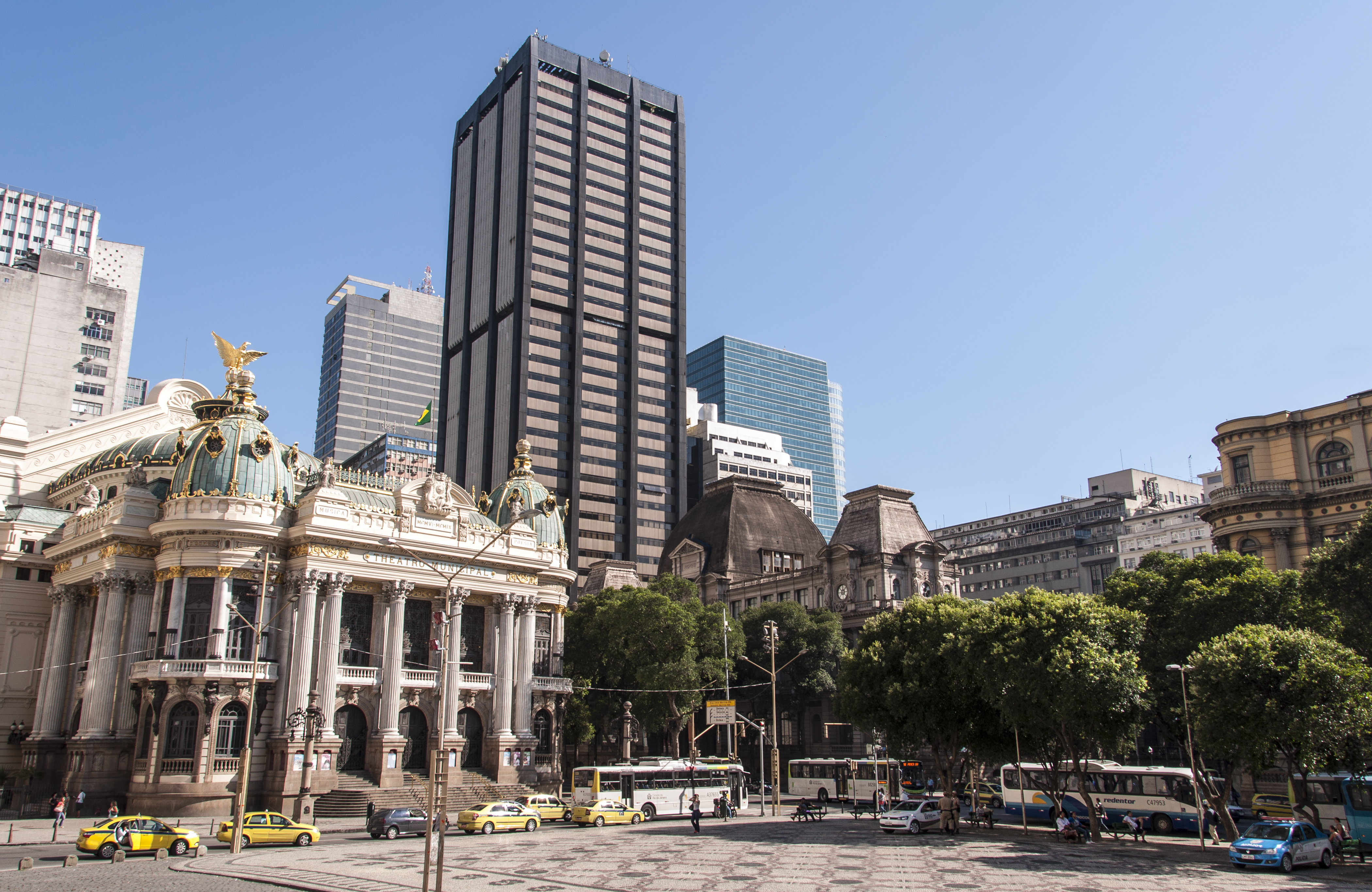 Teatro Municipal: prédio